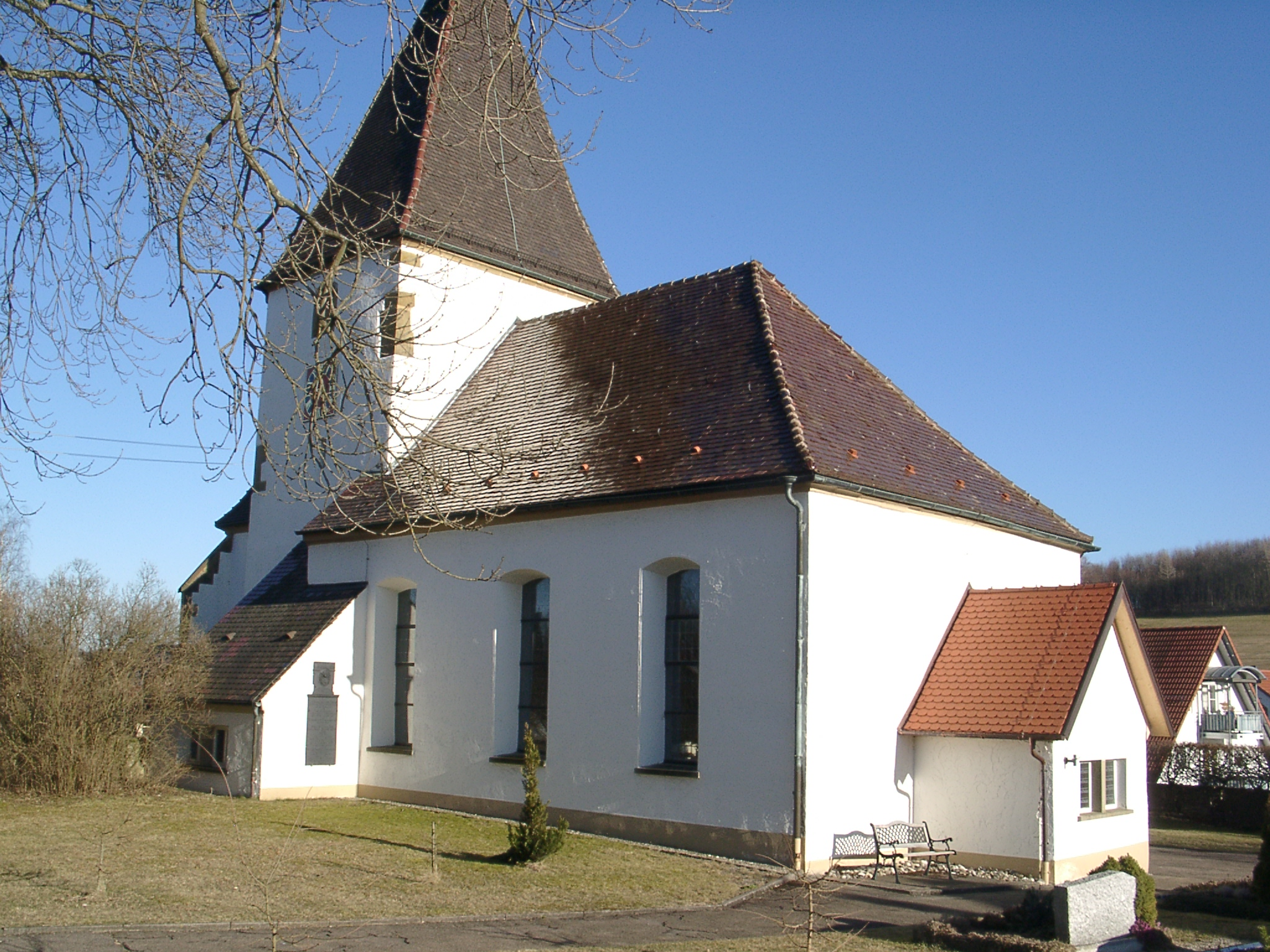 Bartholomäuskirche Bartholomä